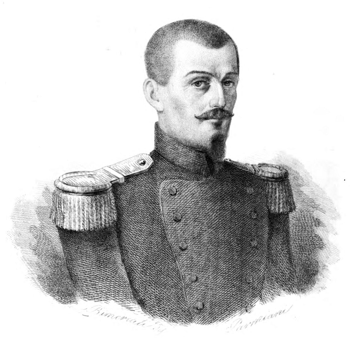 Cesare Rosaroll